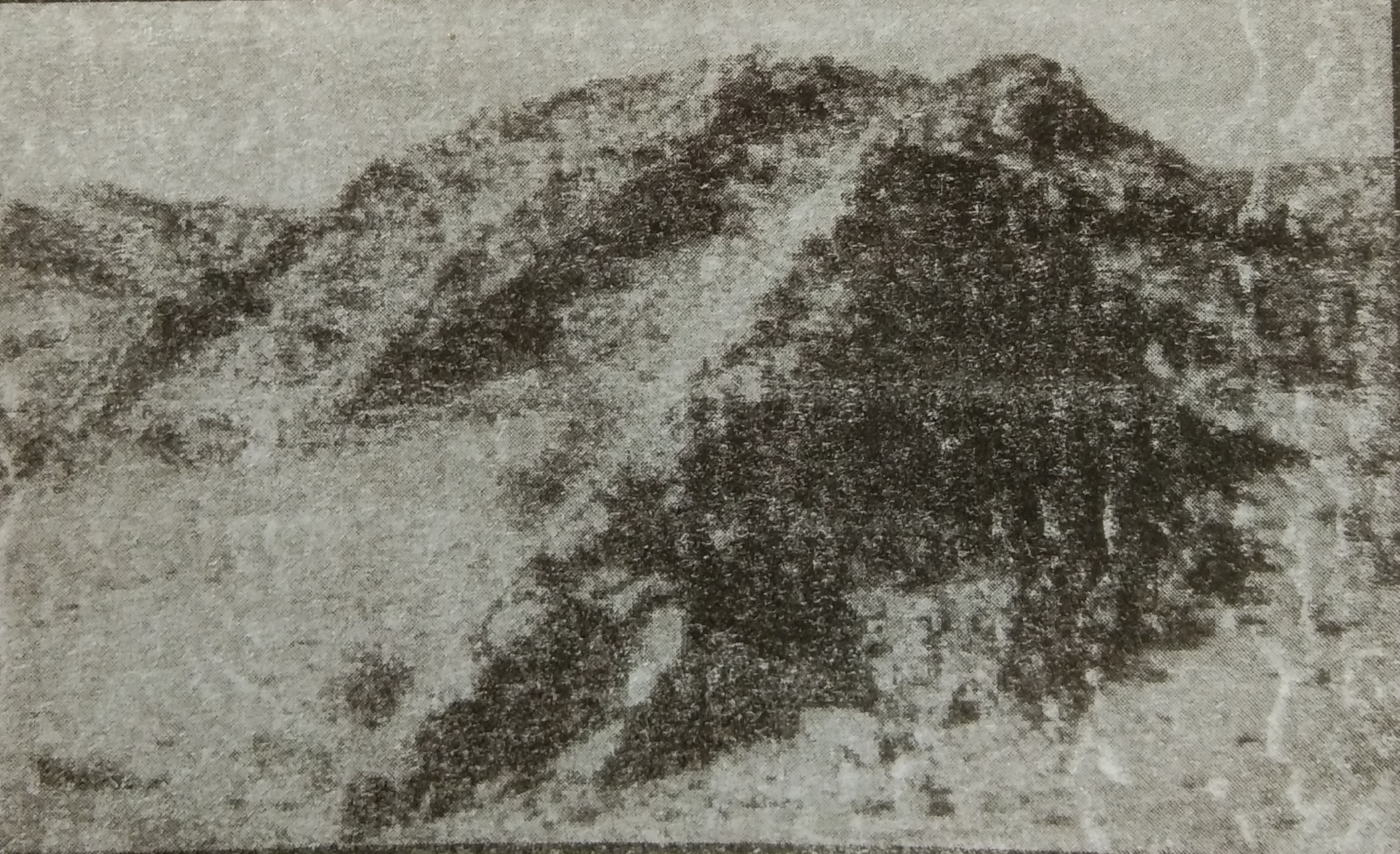 पर्वतीय छाया विधि उच्चावच दर्शाने की